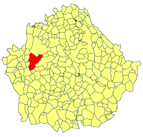 Situación de Carrascosa del Campo en la provincia